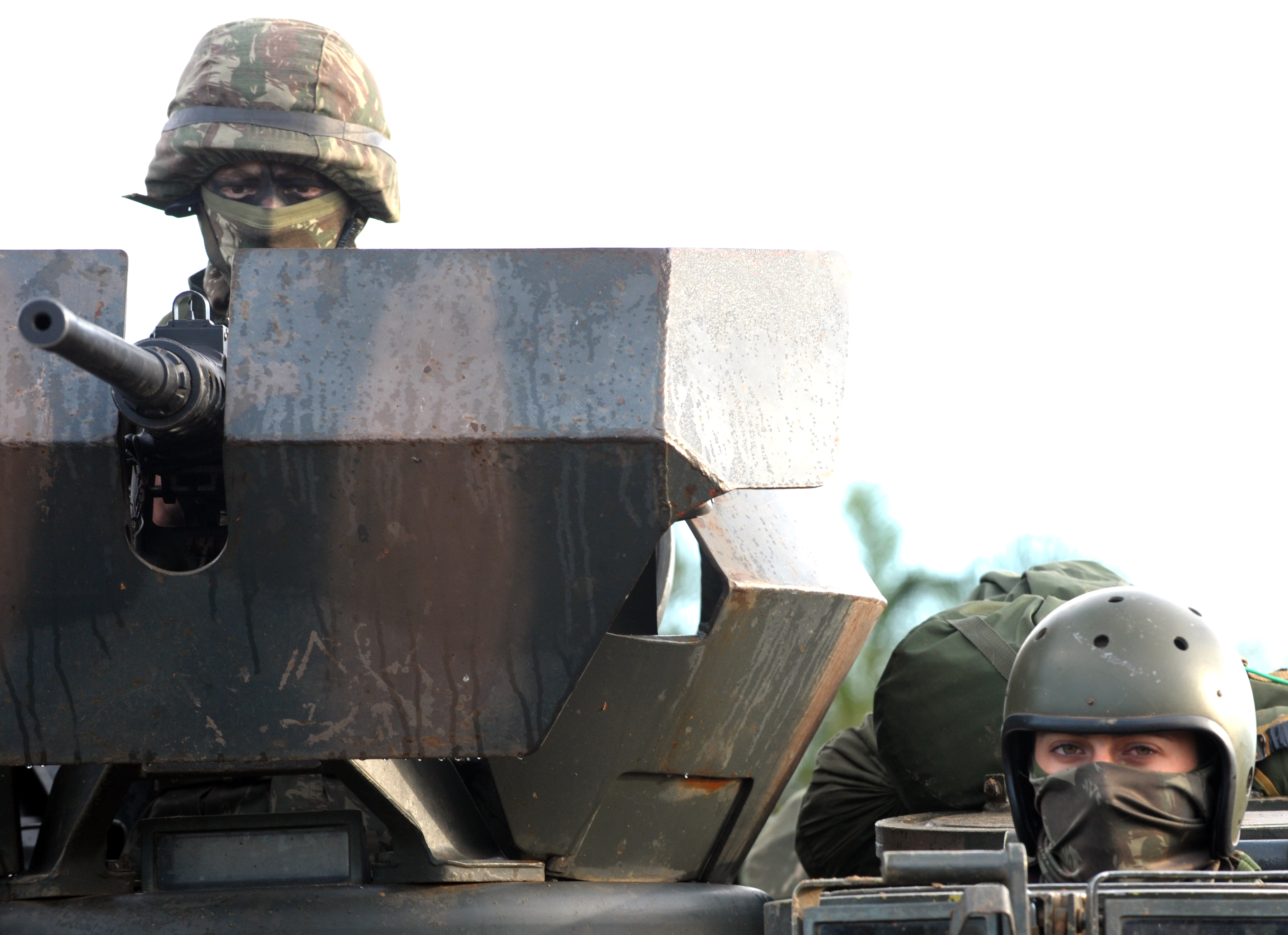 Fotos: Jorge Cardoso